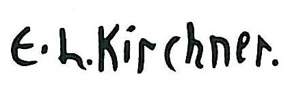 autograph of the painter Ernst Ludwig Kirchner